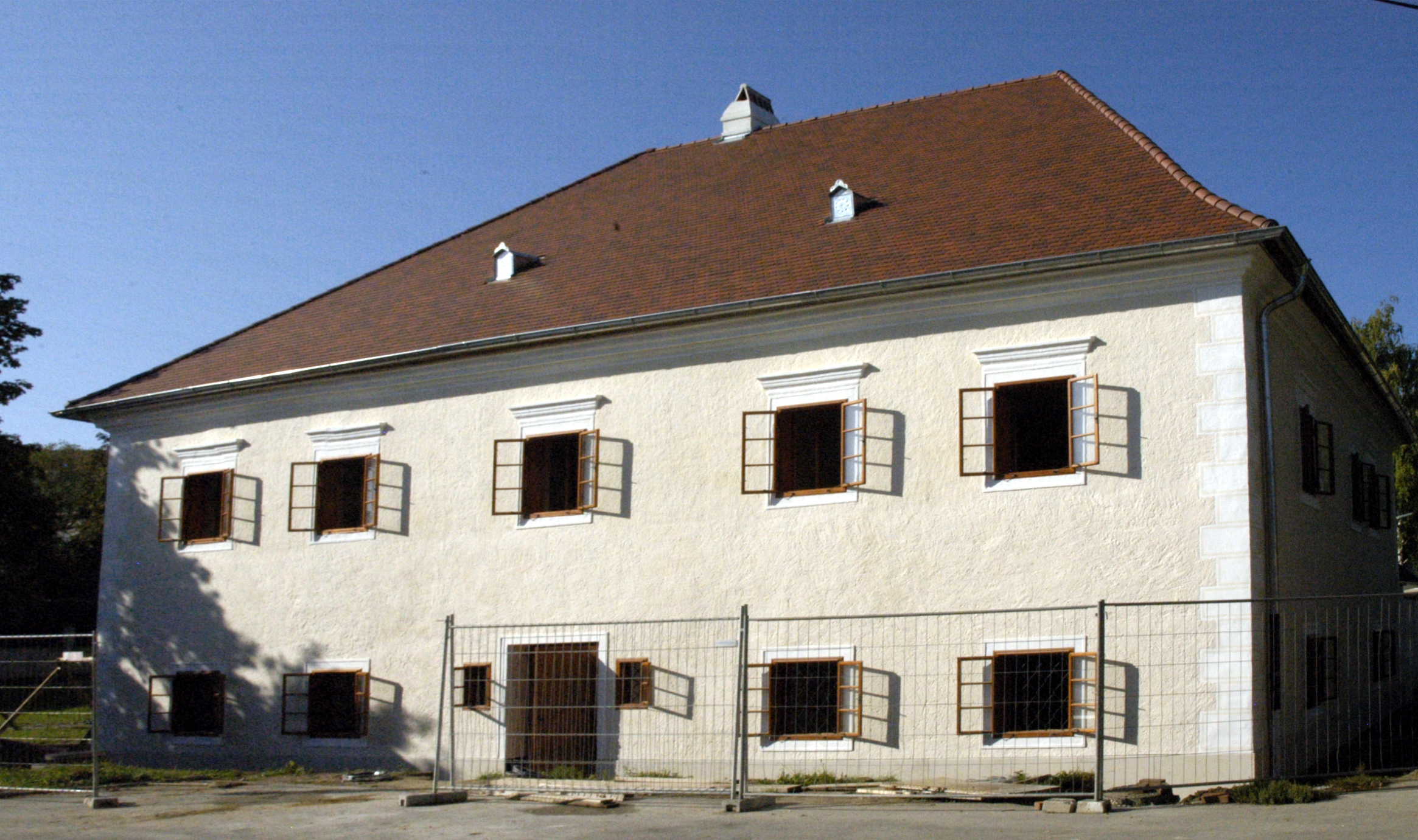 ehemaliger Pfarrhof in Mailberg